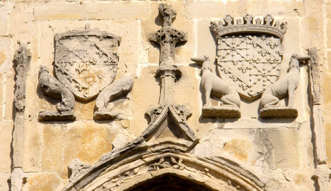 Castillo Viejo-Parador Nacional Principe de Viana (Olite, Navarra)